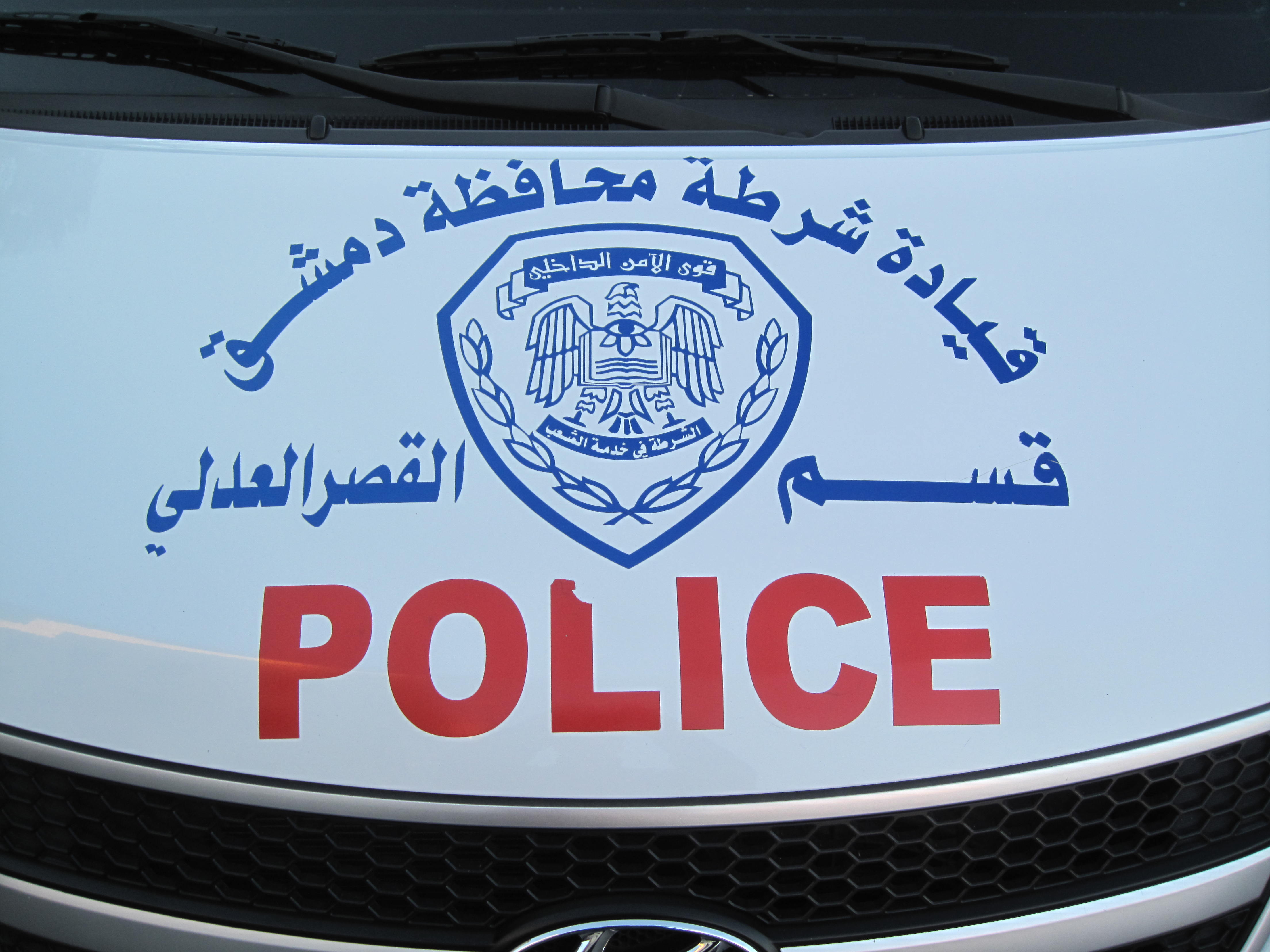 Syrië politie